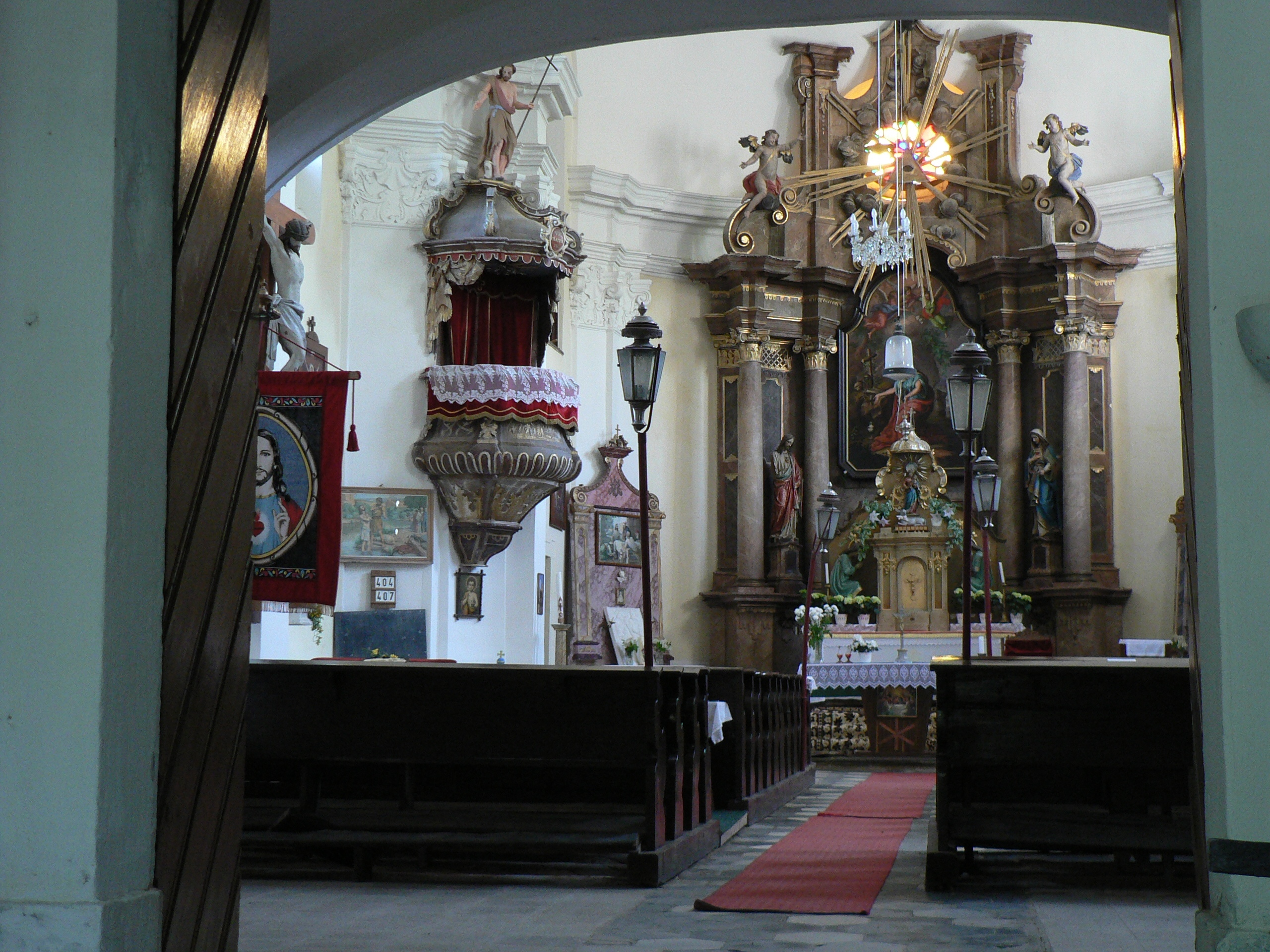 Interiér kostela s. Maří Magdalény v Pustých Žibřidovicích.